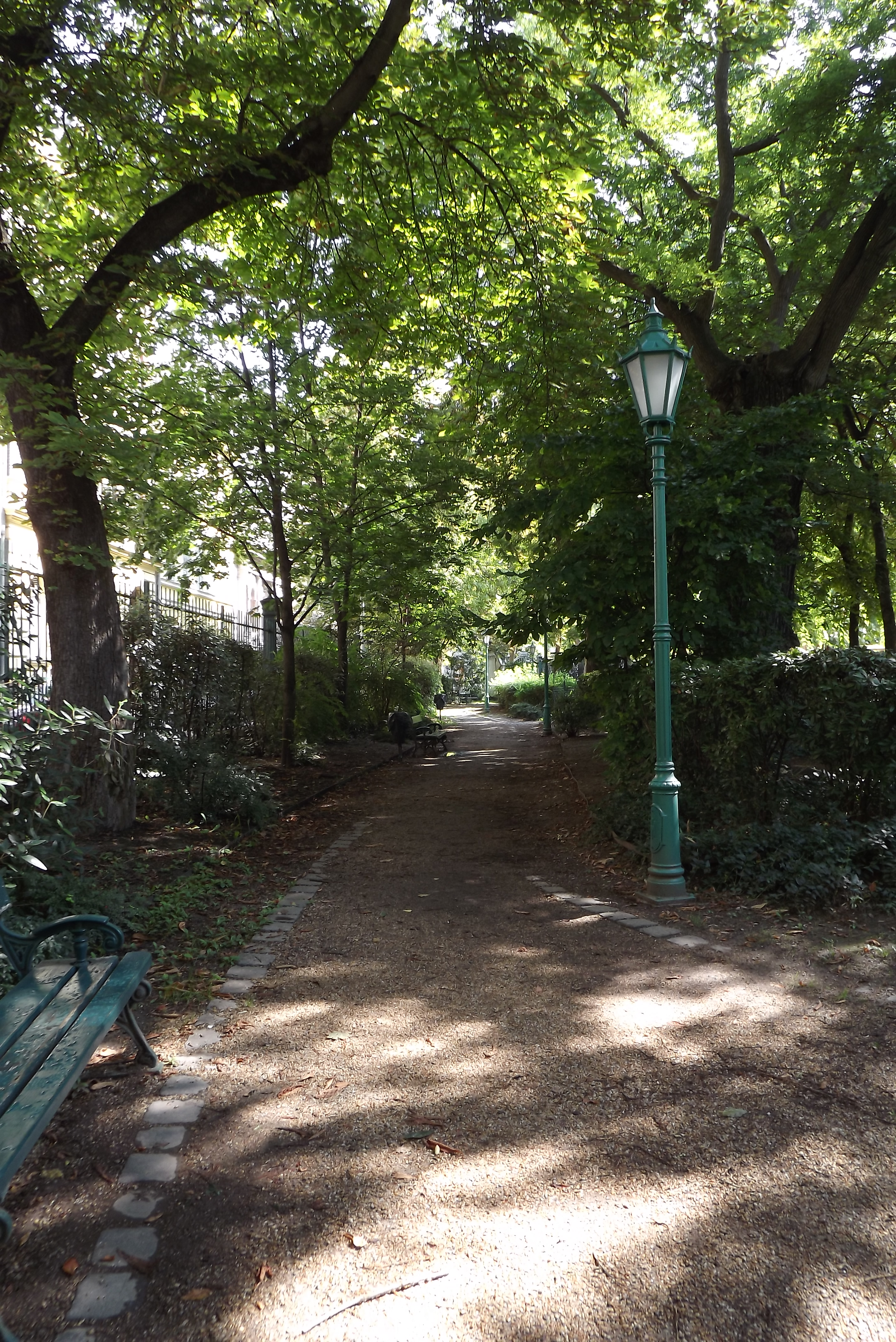 A budapesti Károlyi-kert 2014 augusztusában (Budapest, V. ker.)